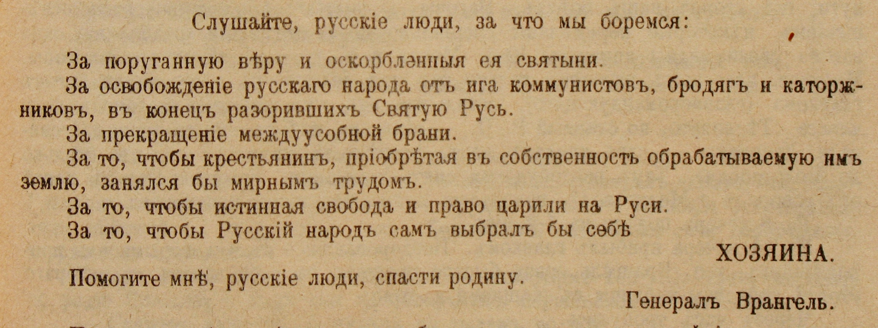 "Слушайте, русские люди, за что мы боремся... За то, чтобы Русский народ сам выбрал бы себе ХОЗЯИНА." Обращение к русскому народу Главнокомандующаго Вооруженными Силами на Юге России генерала Врангеля от 20 мая 1920 года, г. Севастополь. Выпущен перед выходом белой Русской Армии из Крыма.